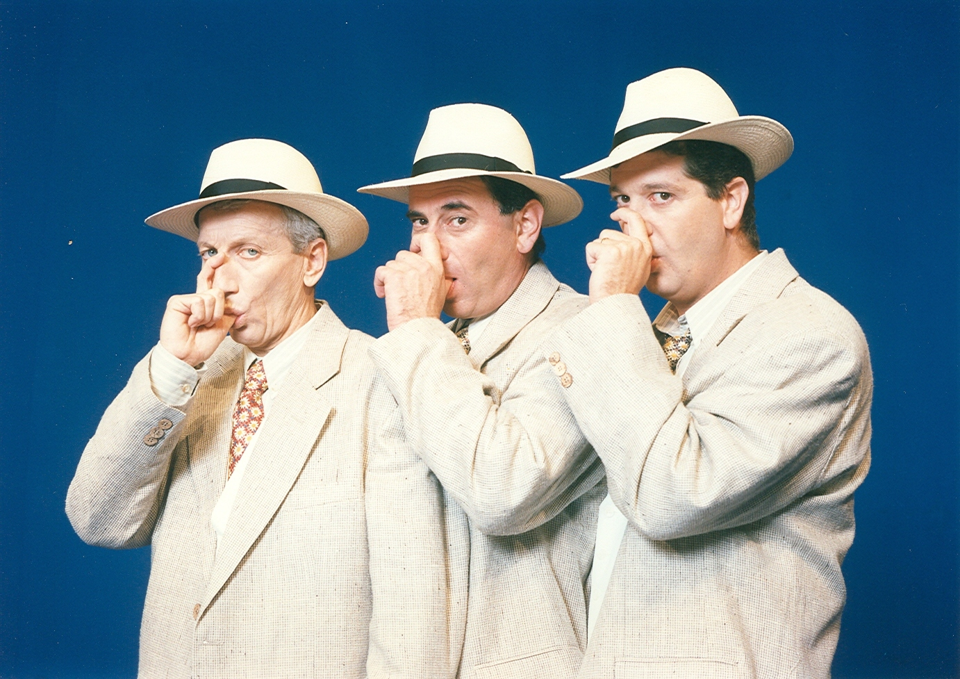 המופע של זהו-זה" ששודרה בערוץ 2 אבי קושניר דב'לה גליקמן ומוני מושונוב